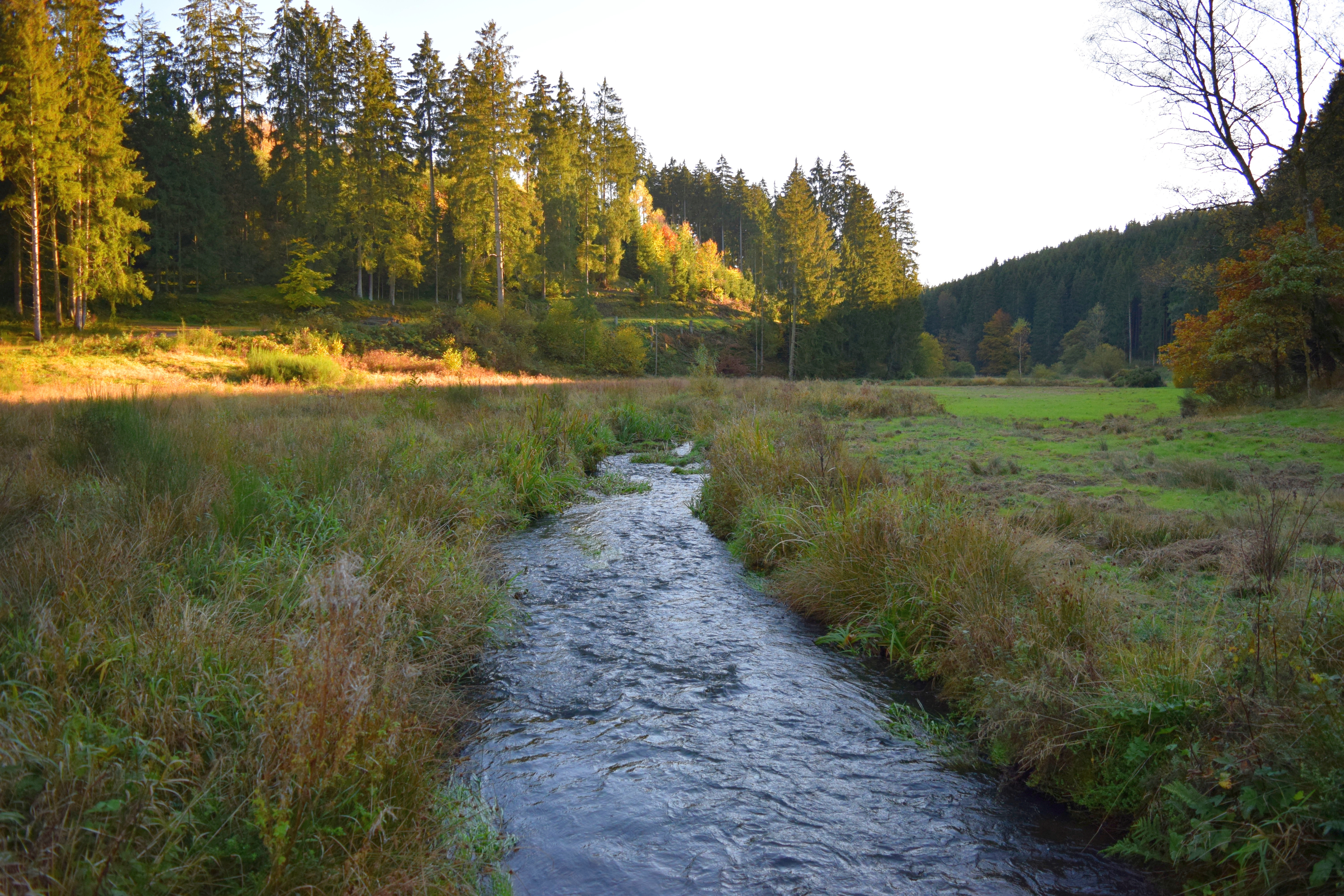 Lauf der Wadrill durch den "Wiesengrund" in Reinsfeld, nahe der Felsformation "Frau Holle"